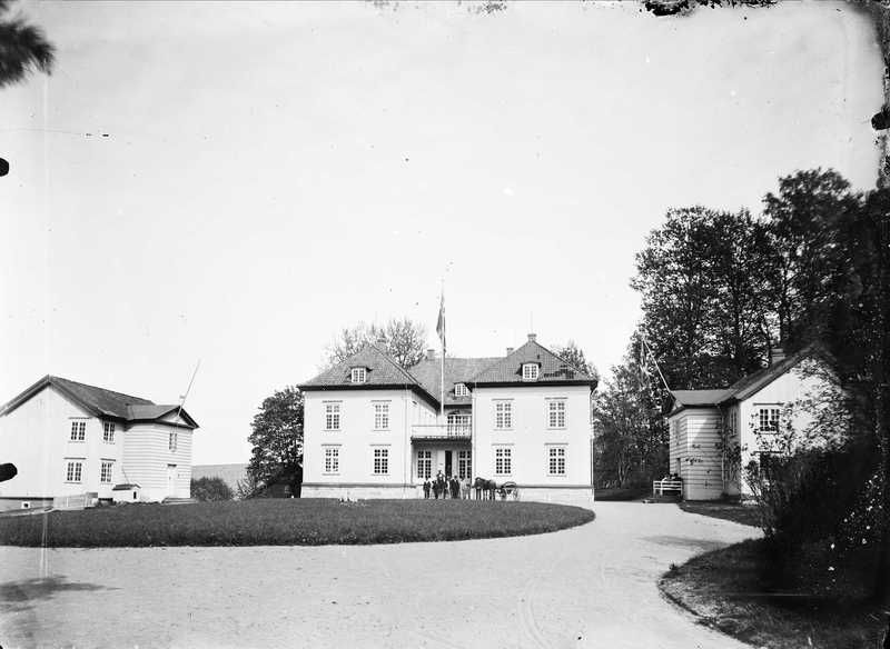 Eidsvollsbygningen fotografert ca 1890, fotograf ukjent